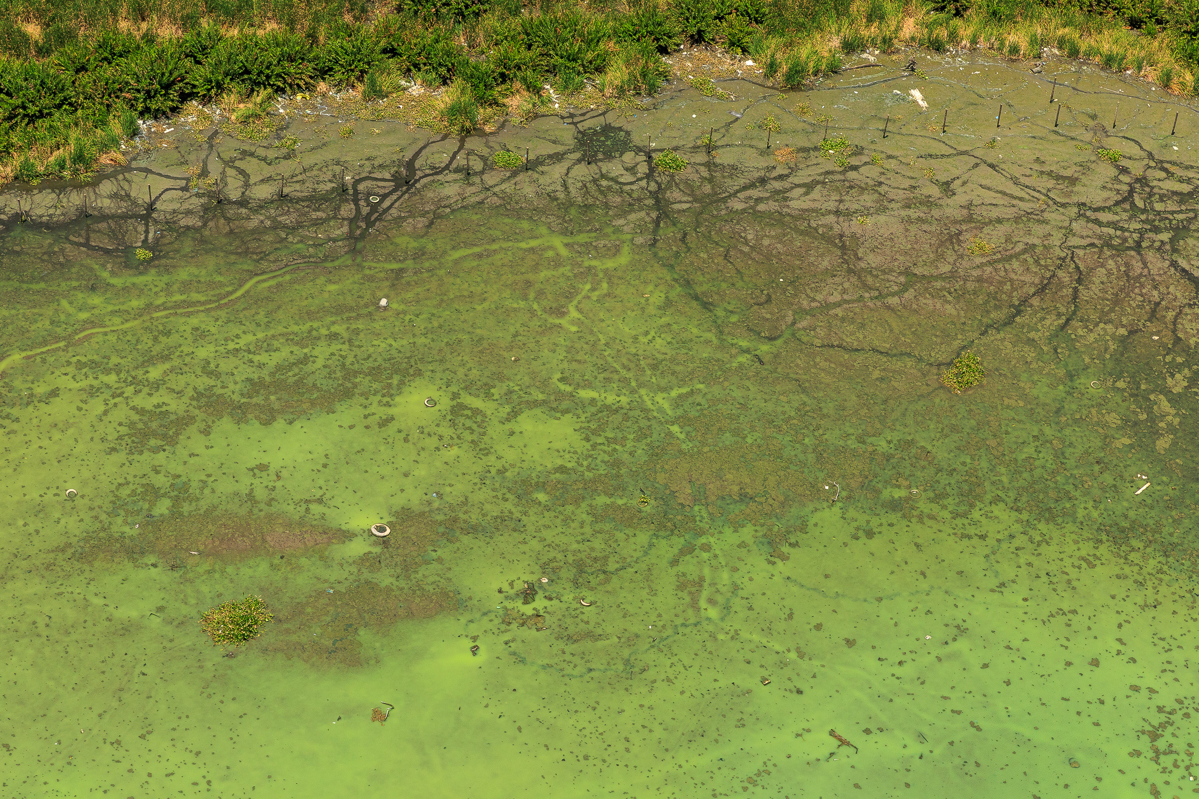 Vista aérea mostra a poluição na Lagoa de Jacarepaguá.